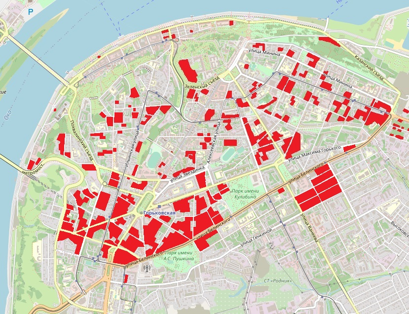 Утраченная историко-архитектурная среда исторического центра Нижнего Новгорода (1991-2020 гг.) Карта взята с Openstreetmap.